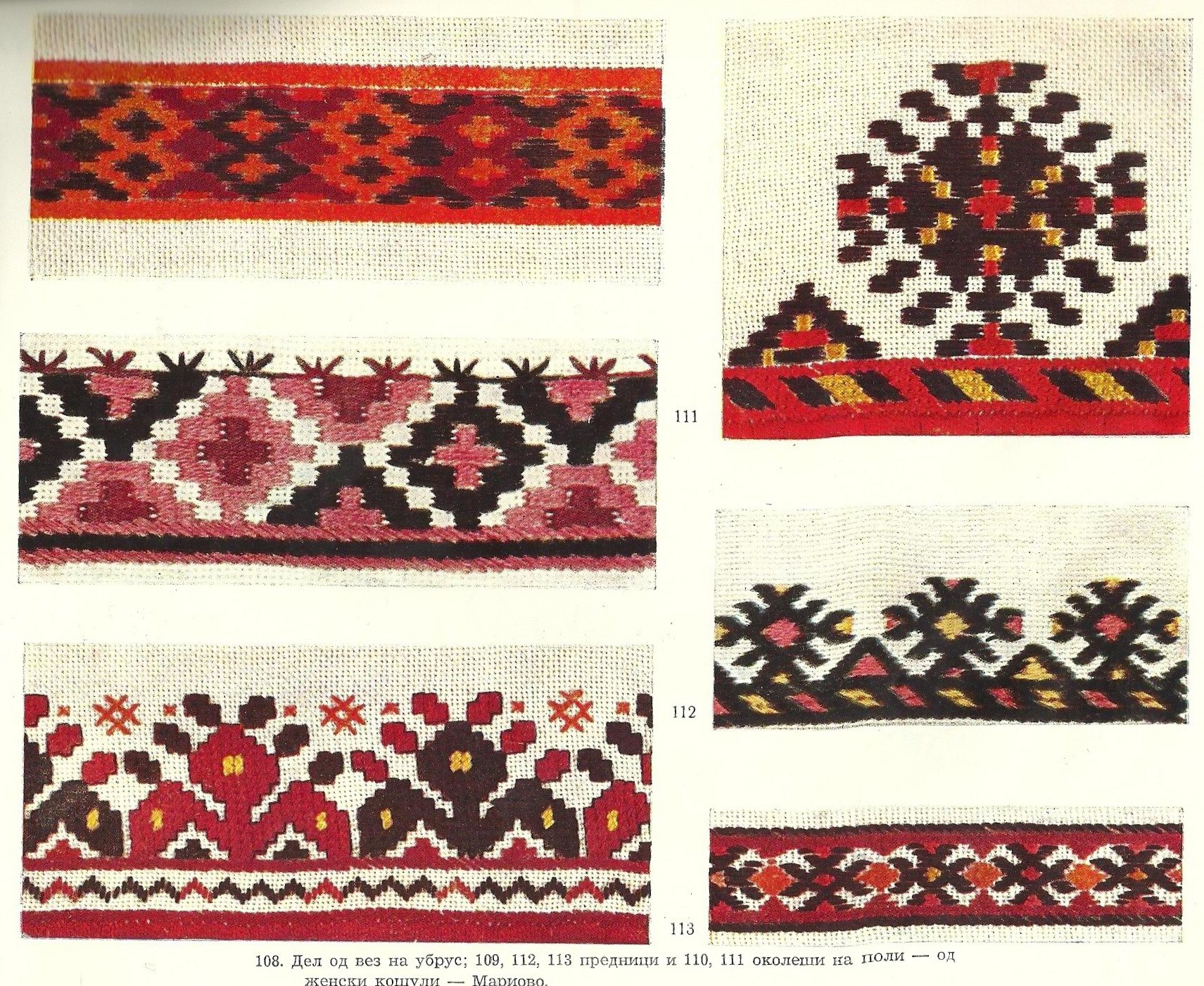 Македонски вез од Мариово